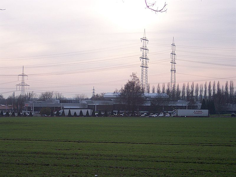 Herta Herten in Langenbochum, dahinter Freileitungen (Bl. 4340 und Bl. 4534)